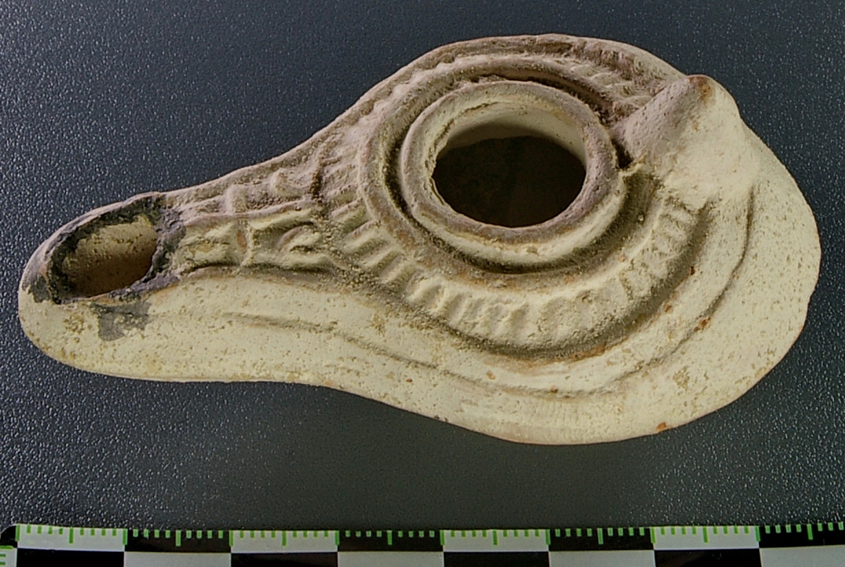 Römisches Öllämpchen aus dem Besitz von Marcus Cyron. Bild digital nachbearbeitet. Original auf Anfrage.